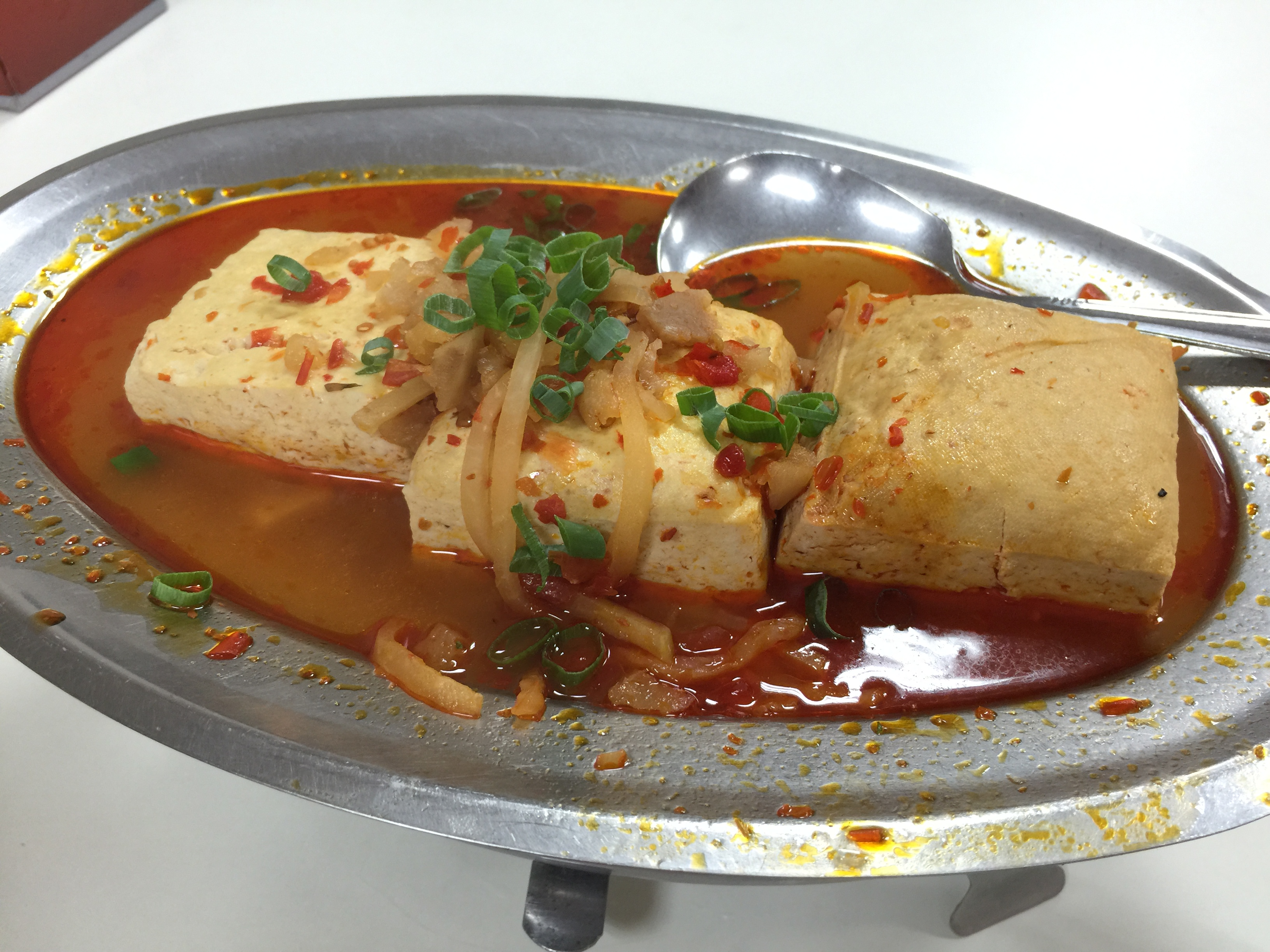 紅油蒸臭豆腐, 大直小館, 台北